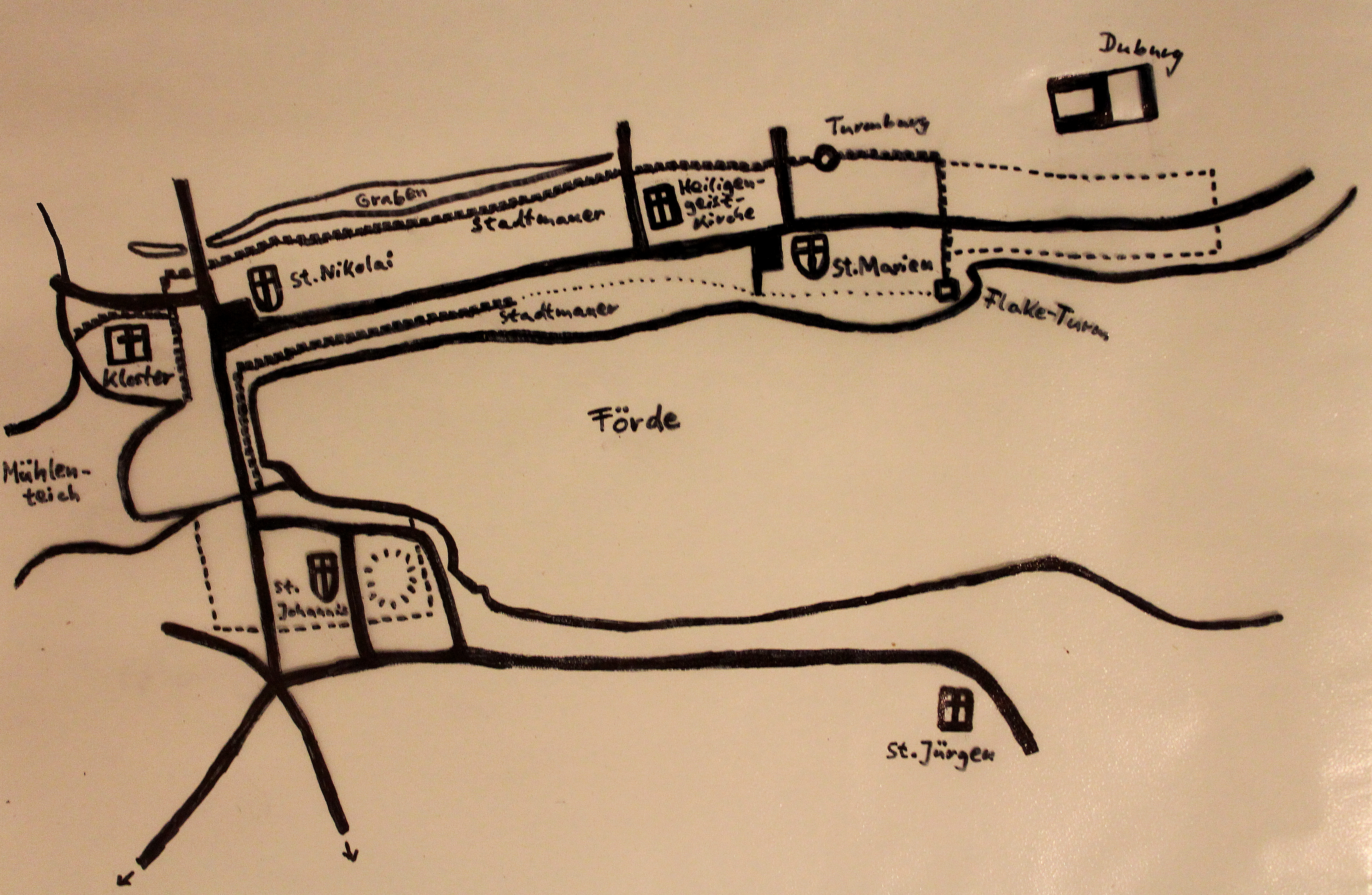 Grobe Skizze von Flensburg zum Ende des Mittelalters (15. Jh.)